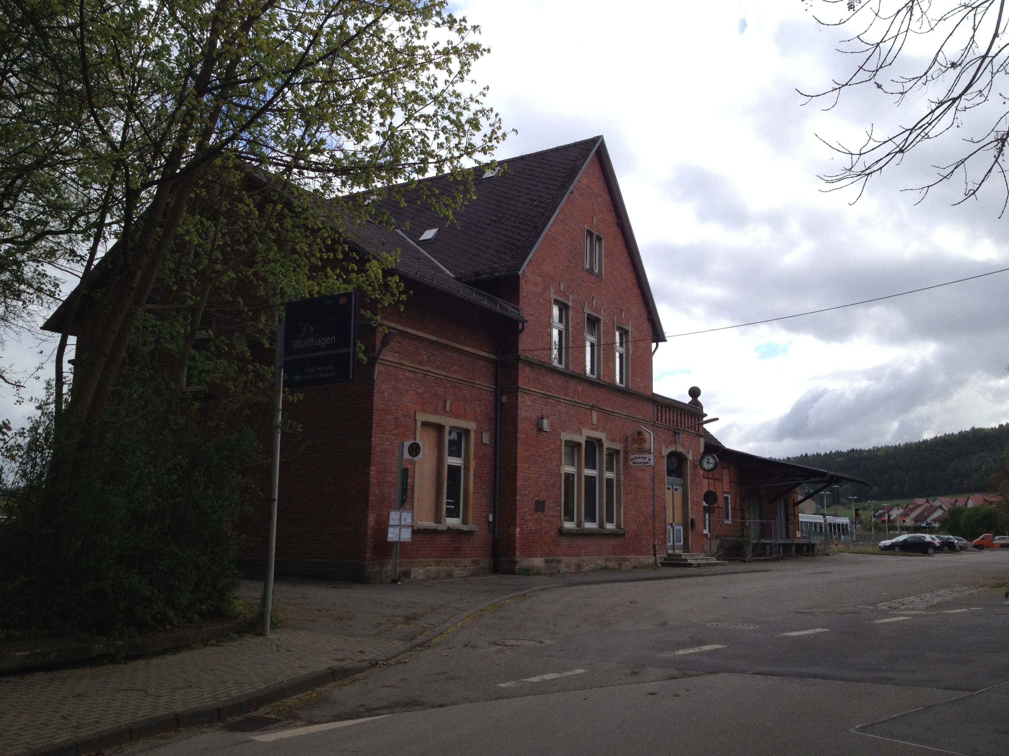 Der Bahnhof Wolfhagen (Bahnhofsvorplatz / Bahnhofsstraße)